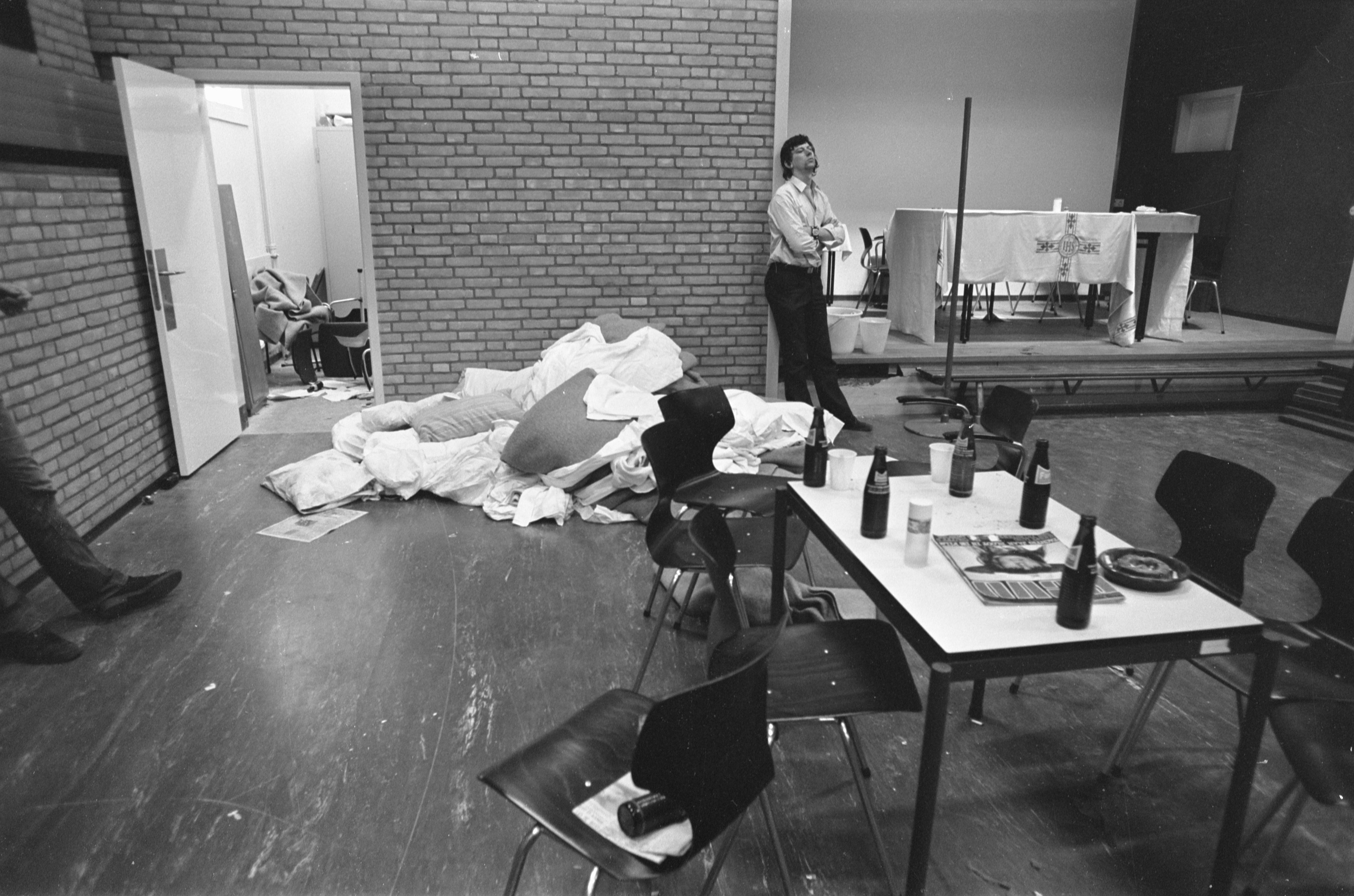 Collectie / Archief : Fotocollectie Anefo Reportage / Serie : [ onbekend ] Beschrijving : Gijzeling in Scheveningen afgelopen; het kerkzaaltje waar gijzeling zich afspeelde, rechtsboven het altaartje van aalmoezenier De Bot Datum : 31 oktober 1974 Locatie : Scheveningen, Zuid-Holland Trefwoorden : gijzelingen Persoonsnaam : De Bot Fotograaf : Mieremet, Rob / Anefo Auteursrechthebbende : Nationaal Archief Materiaalsoort : Negatief (zwart/wit) Nummer archiefinventaris : bekijk toegang 2.24.01.05 Bestanddeelnummer : 927-5528